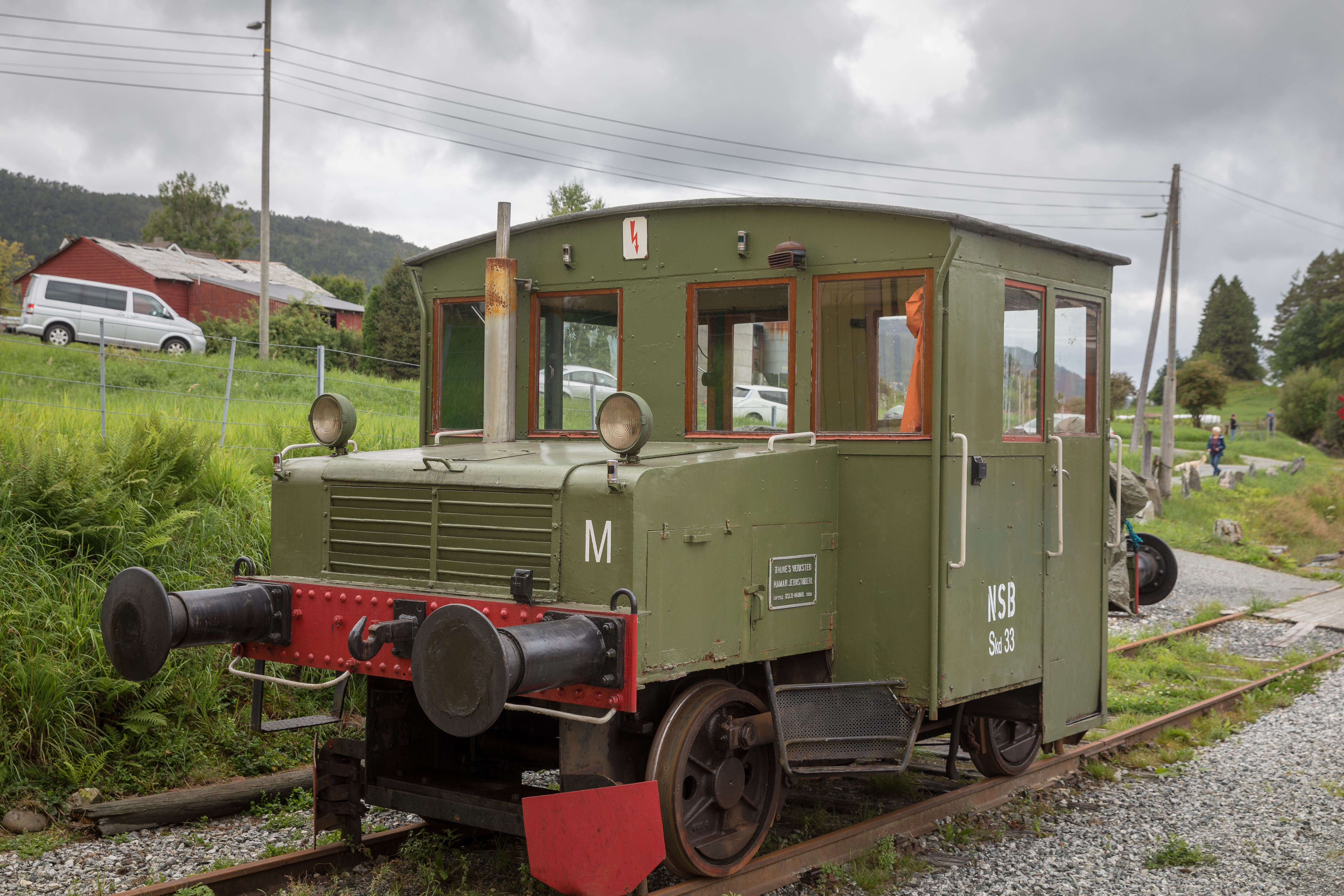 Arrangement: Dag 4 - Garnes – Midttun - Fjordsteam 2018Høve: Fjordsteam